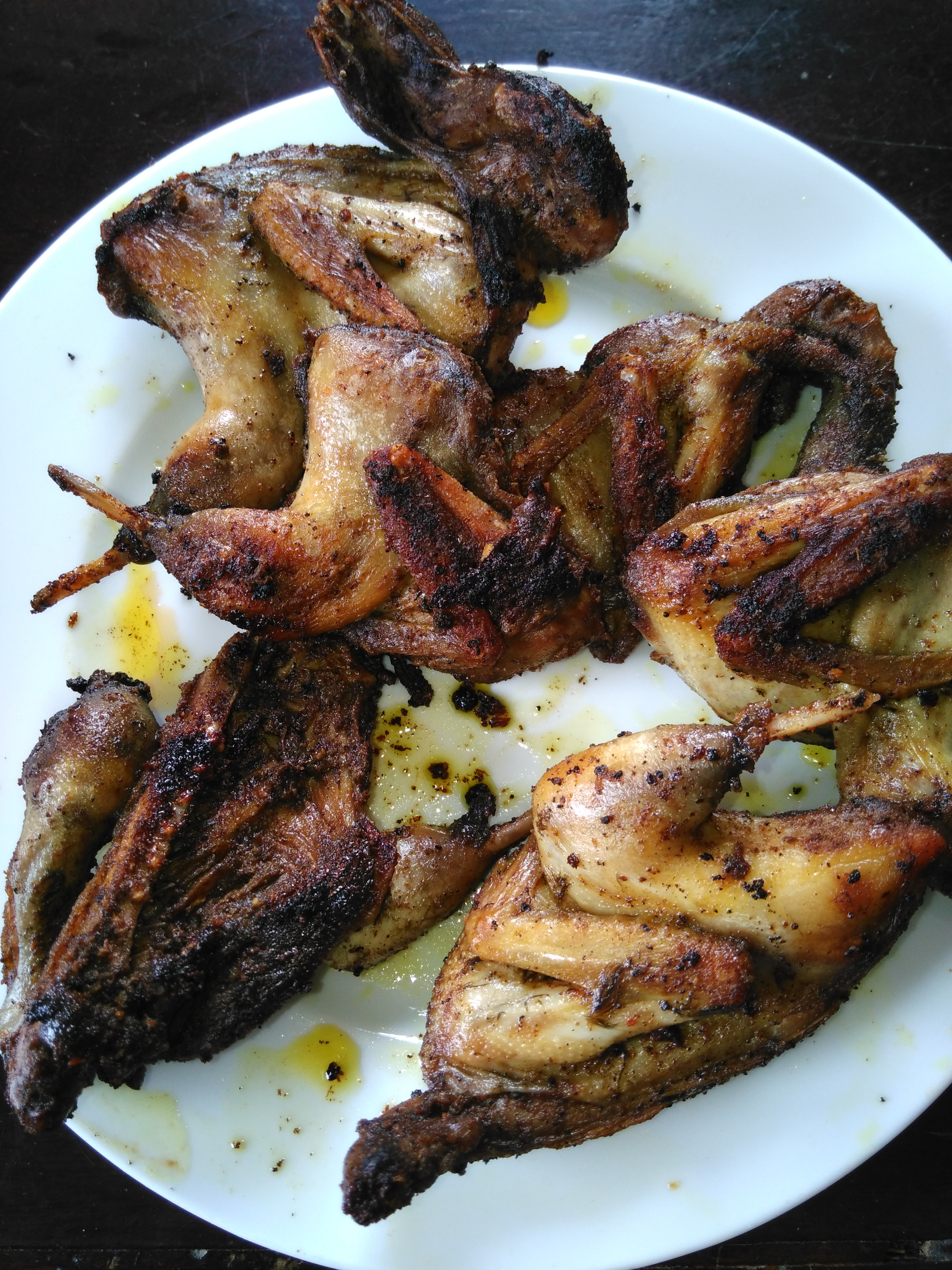 Hình tự chụp bằng máy di động cá nhân về một món thịt chim cút nướng